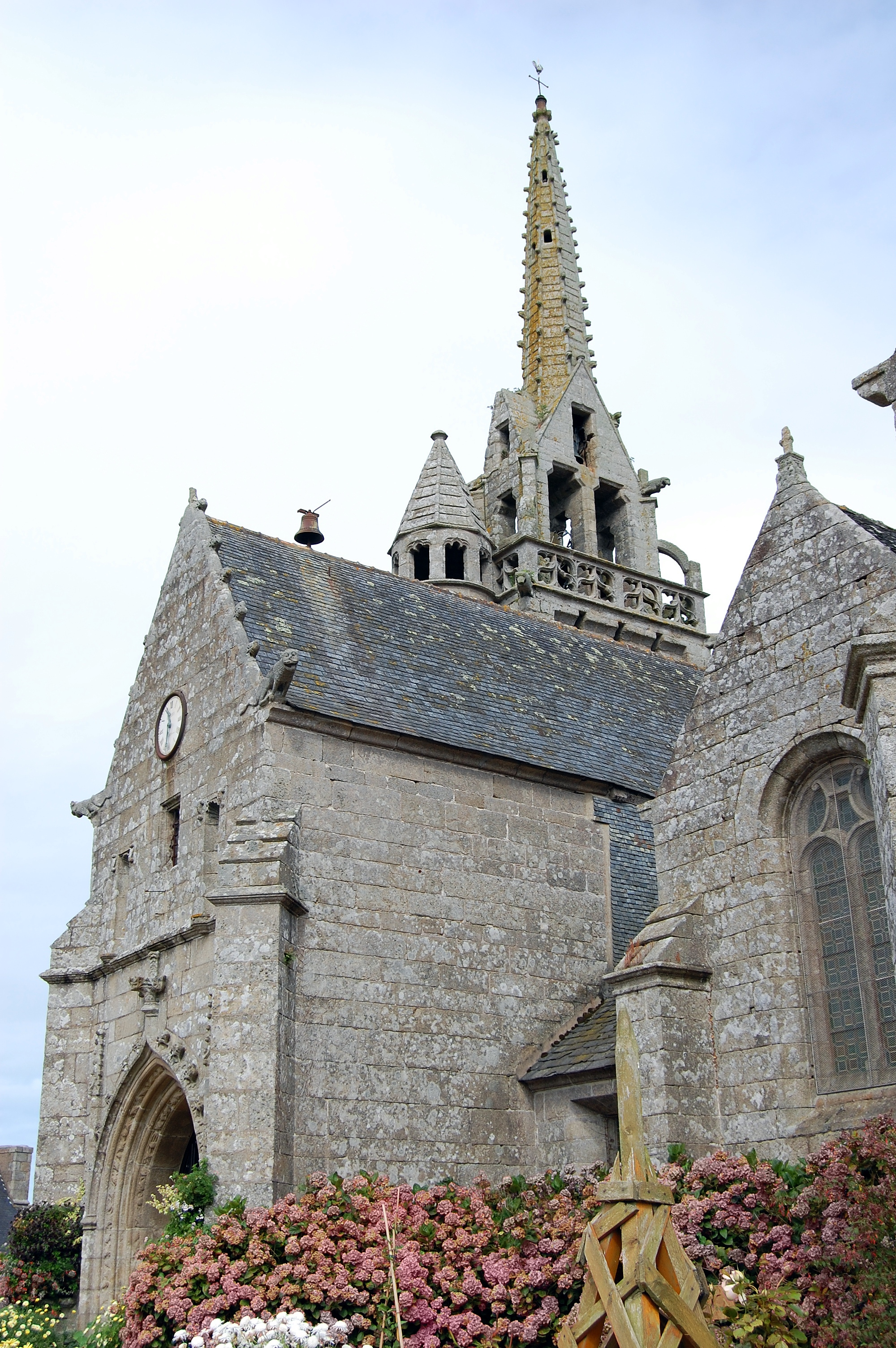 Église de Ploumilliau, France.